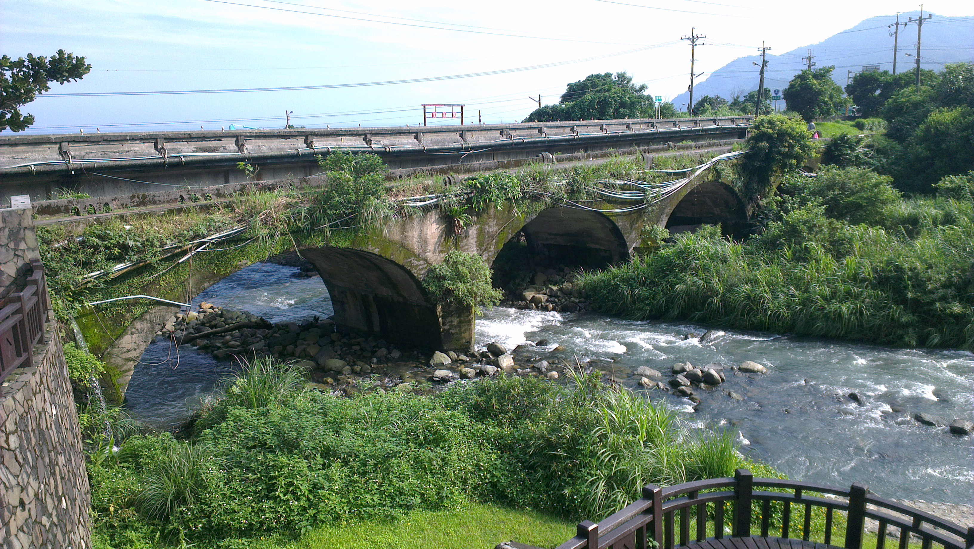 中文（台灣）: 宜蘭舊大溪橋